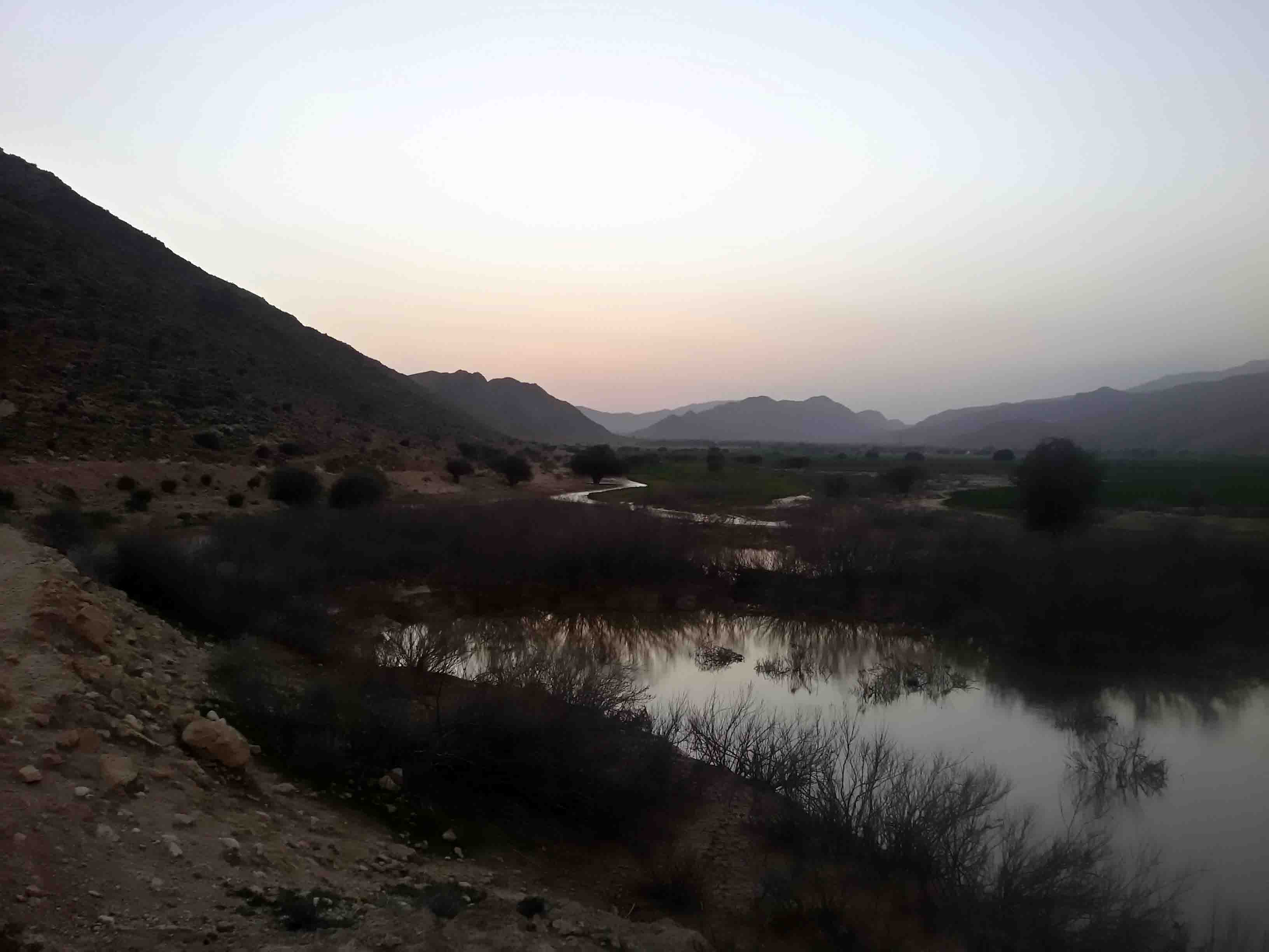 تنگه کلون